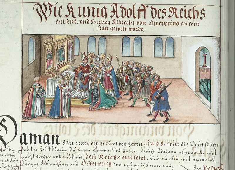 Absetzung Adofs von Nassau und Wahl Albrechts I. zum König Chronik der Würzburger Bischöfe Wie Kunig Adolff des Reichs entsetzt, vnd Hertzog Albrecht von Osterreich an sein statt gewelt warde Bischof:Manegold von Neuenburg (1287 - 1303)